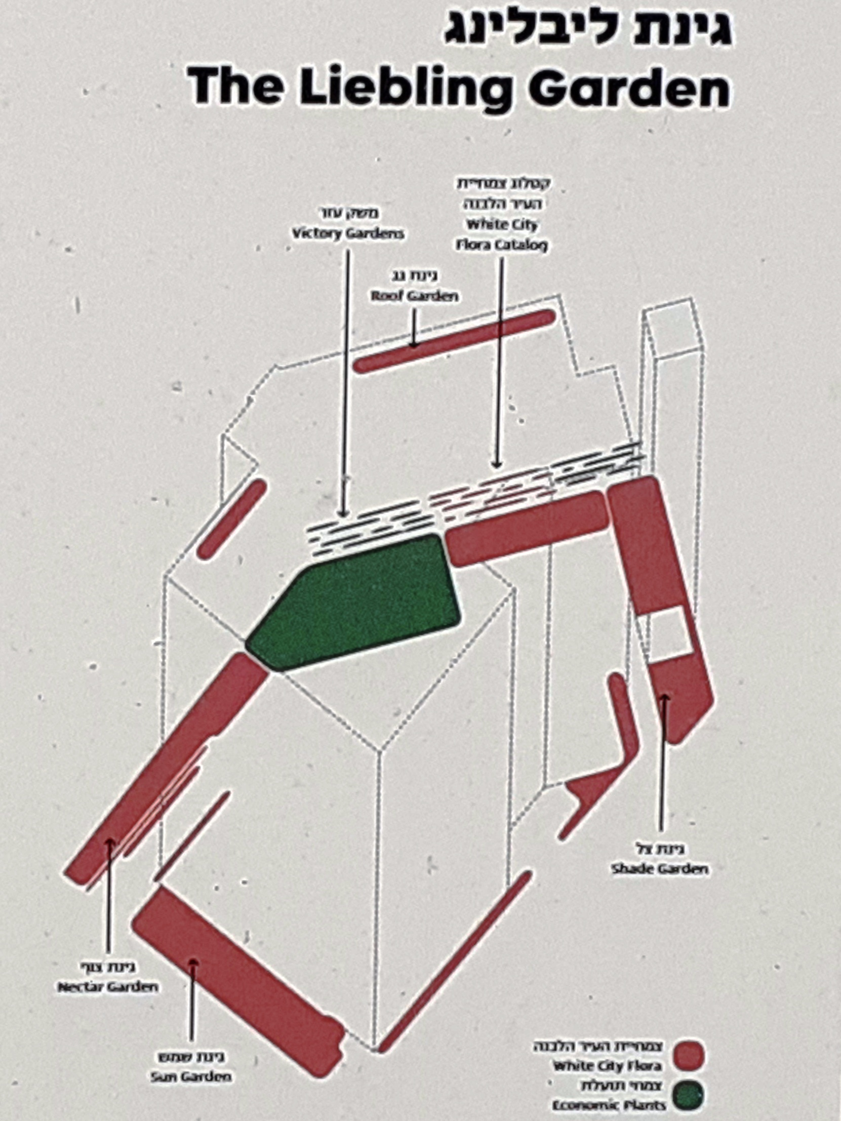 Der Beit Liebling (בֵּית לִיבְּלִינְג) / das Lieblinghaus Skizze, die die Umrisse der Baukörper des Hauses andeuten und flächig Gärtchen und Beete um das und auf dem Haus, Quartier Bialik, Tel Aviv-Jaffa